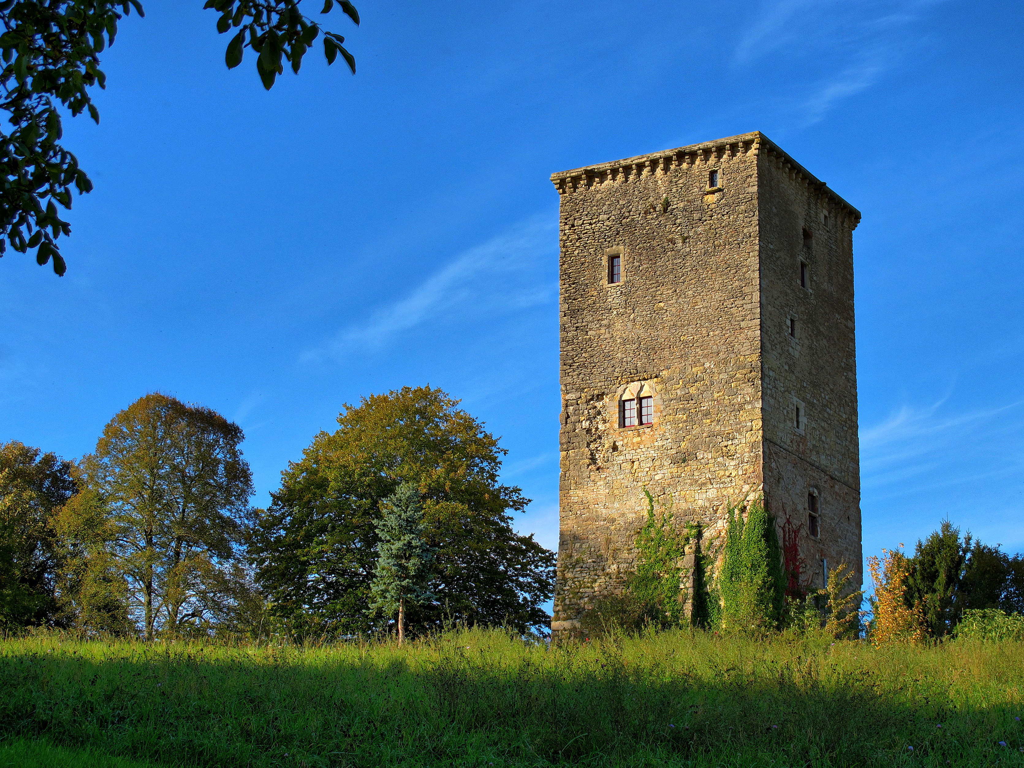 Inscrit aux monuments historiques sous le numéro PA00102116